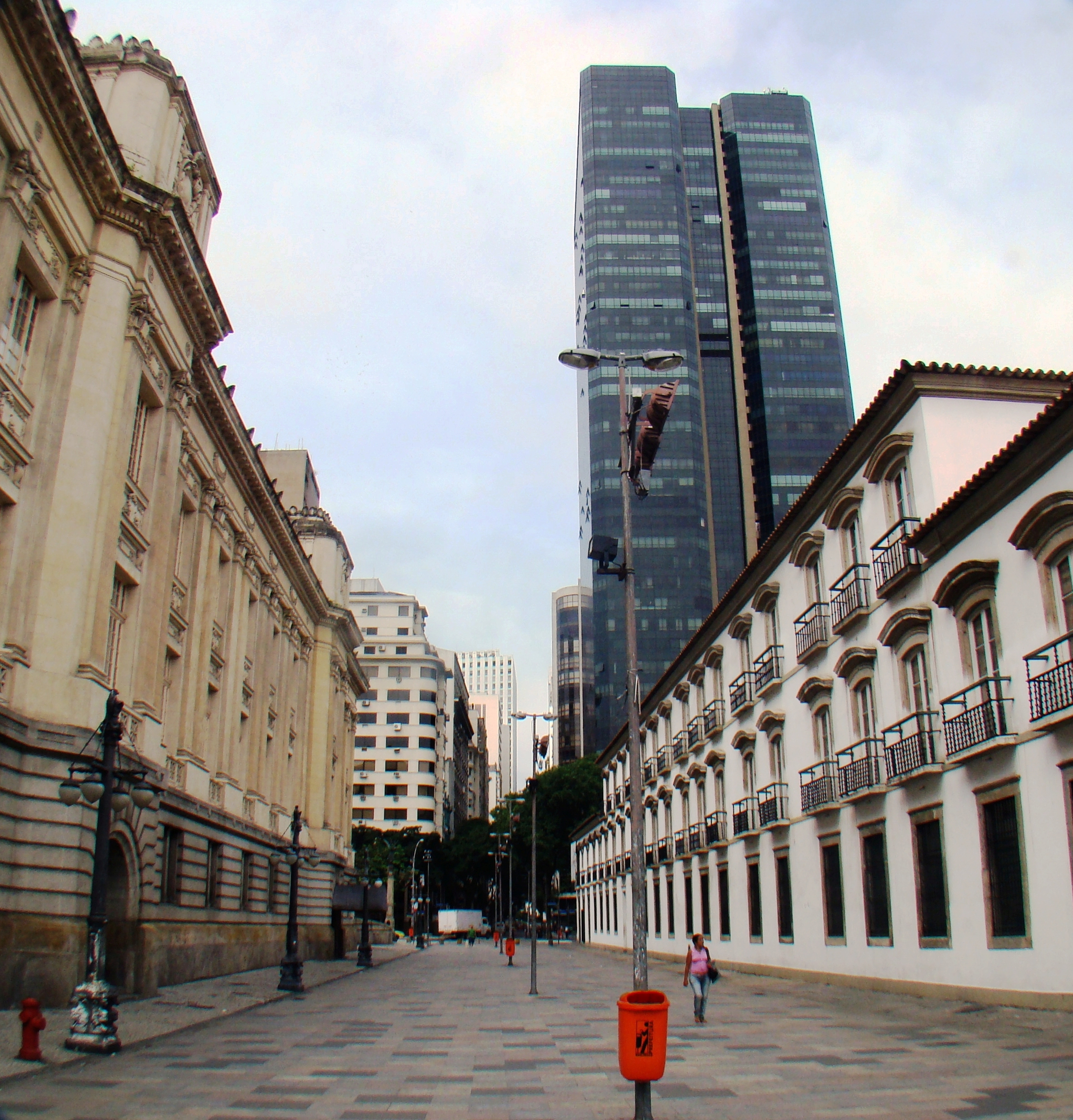 Rua da Assembléia in Rio de Janeiro, Brasil.